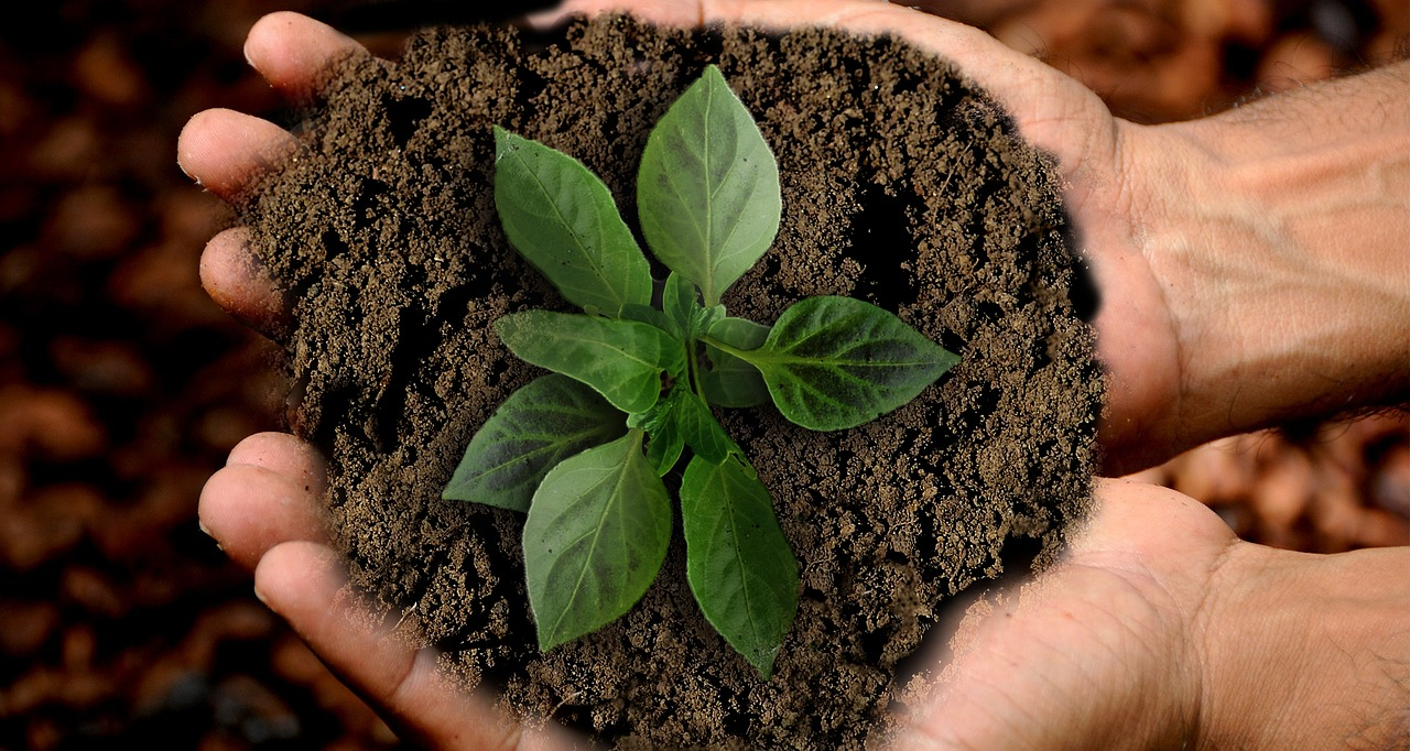 L'agricolutra sociale è... Prendersi cura